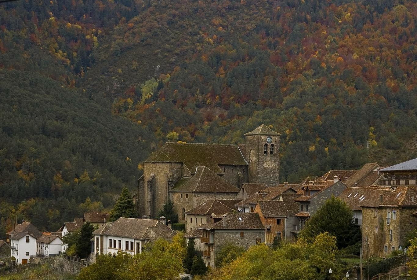 Ambista d'Ansó con a suya ilesia de San Per, d'estilo gotico, con as colors d'agüerro en as fuellas d'os arbols.